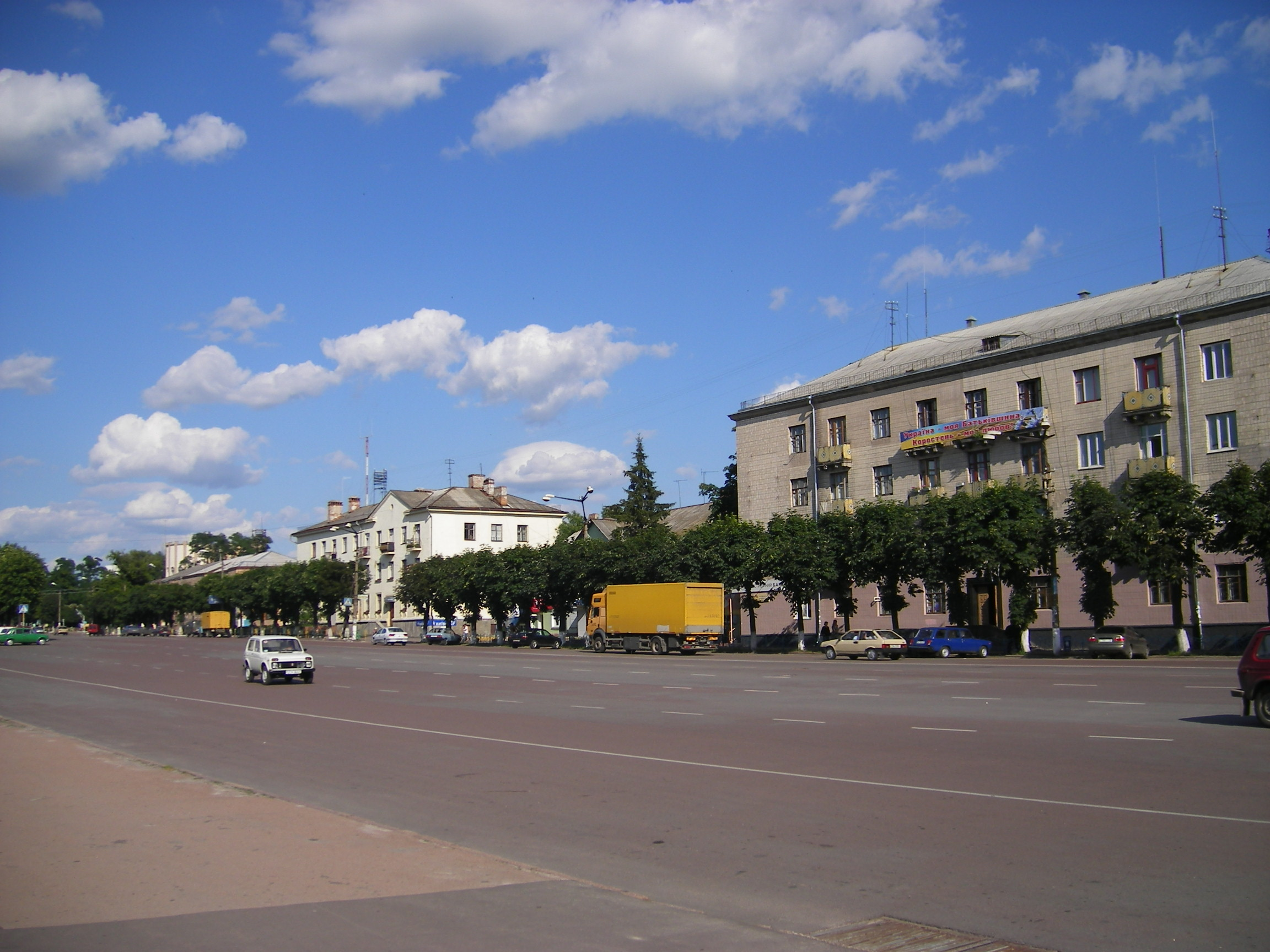 Korosten, Zhytomyr Oblast, Main Street